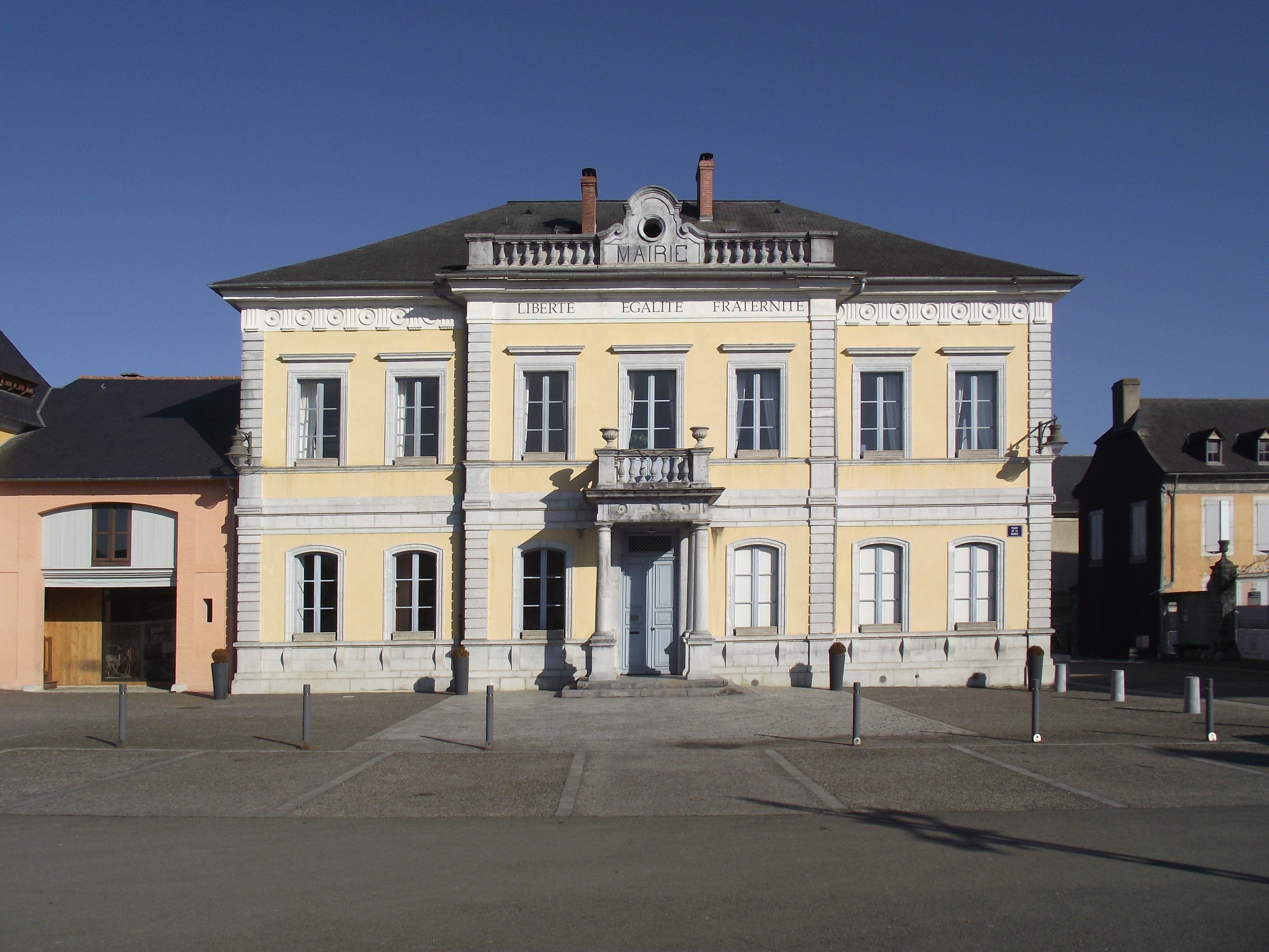 Mairie d'Azereix (Hautes-Pyrénées, France)